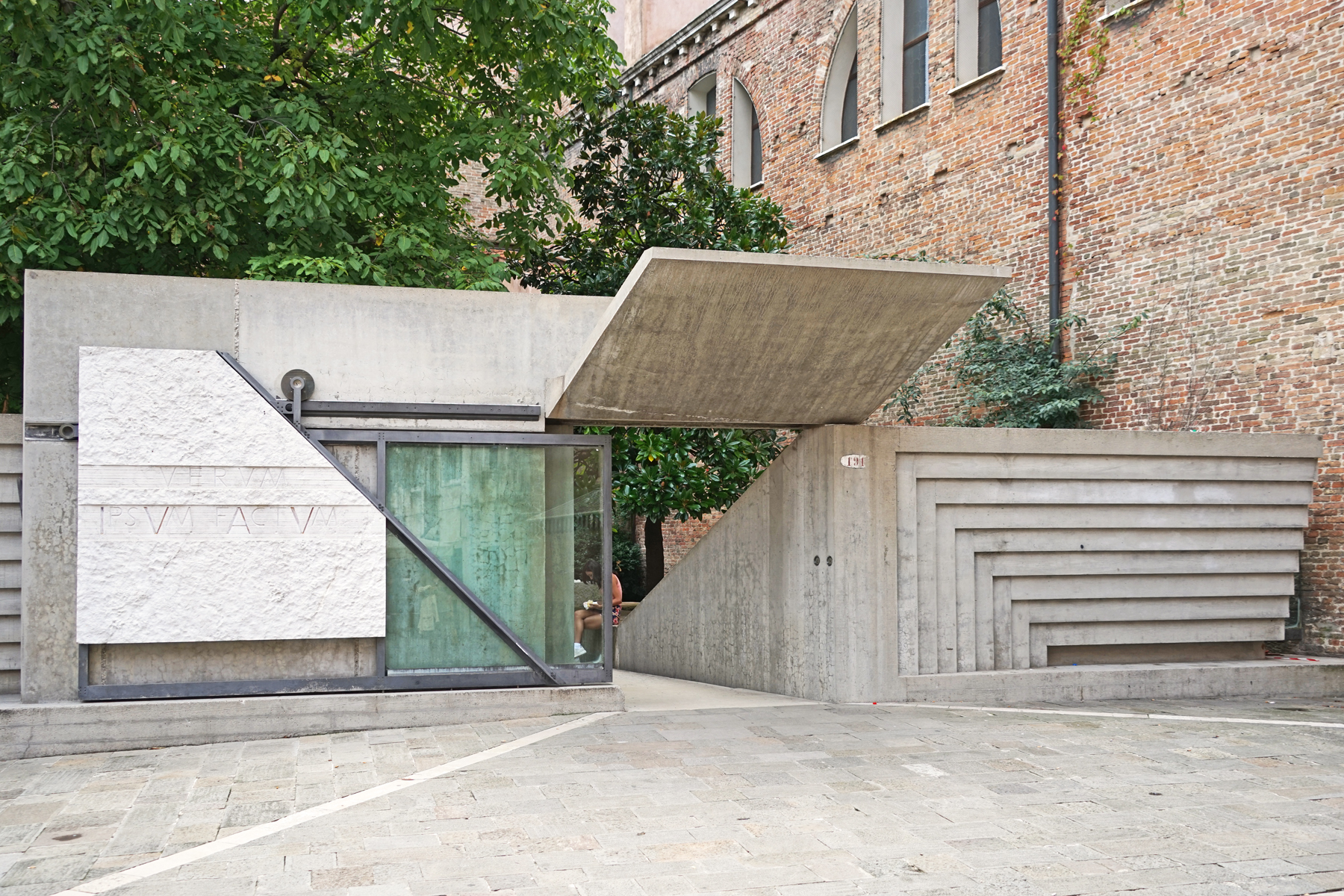 L'entrée Tolentini de l'université d'architecture IUAV à Venise selon un projet du grand architecte vénitien Carlo Scarpa Réalisée en 1985 par Sergio Los, un collaborateur de Carlo Scarpa mais après la mort de ce dernier, l'entrée Tolentini de l'université d'architecture de Venise est inspirée de nombreux croquis du maître. Construite à l'entrée du couvent des Tolentini, à proximité de l'église San Nicola da Tolentino au nord de Venise, ce petit ensemble architectural s'intègre parfaitement à son environnement historique tout en donnant à l'université une identité visuelle forte. On reconnait dans cette entrée, constituée d'un portail ouvrant sur un petit jardin dans lequel Carlo Scarpa a conservé le portail d'origine mais l'a couché au sol dans un bassin d'eau, certains éléments plastiques caractéristiques de ses créations : les fentes, bordures et motifs en dent de scie, les bassins peu profonds, l'intégration d'éléments architecturaux anciens aux structures nouvelles en béton ou en pierre, le travail sur les obliques..